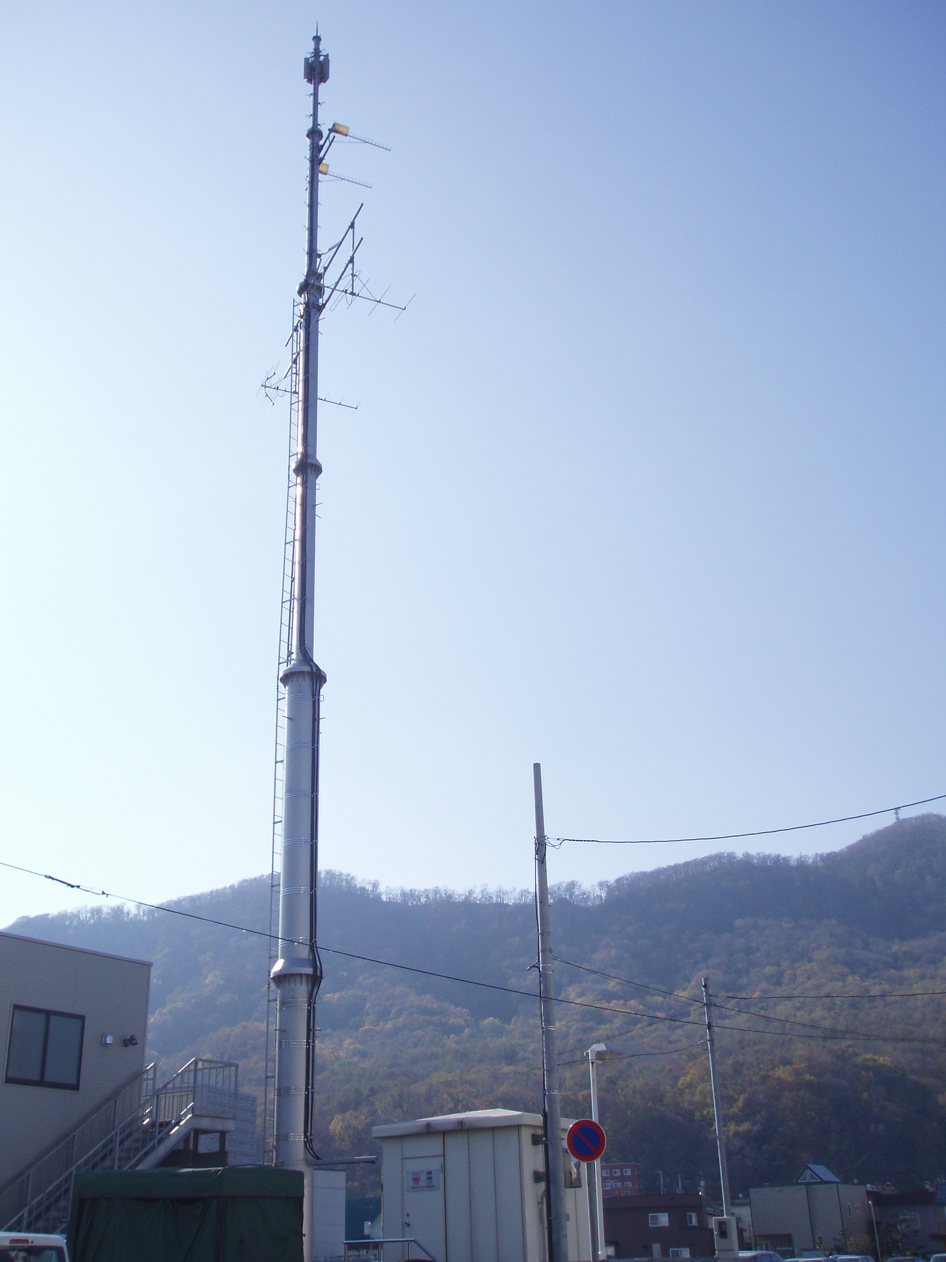 札幌山元中継局